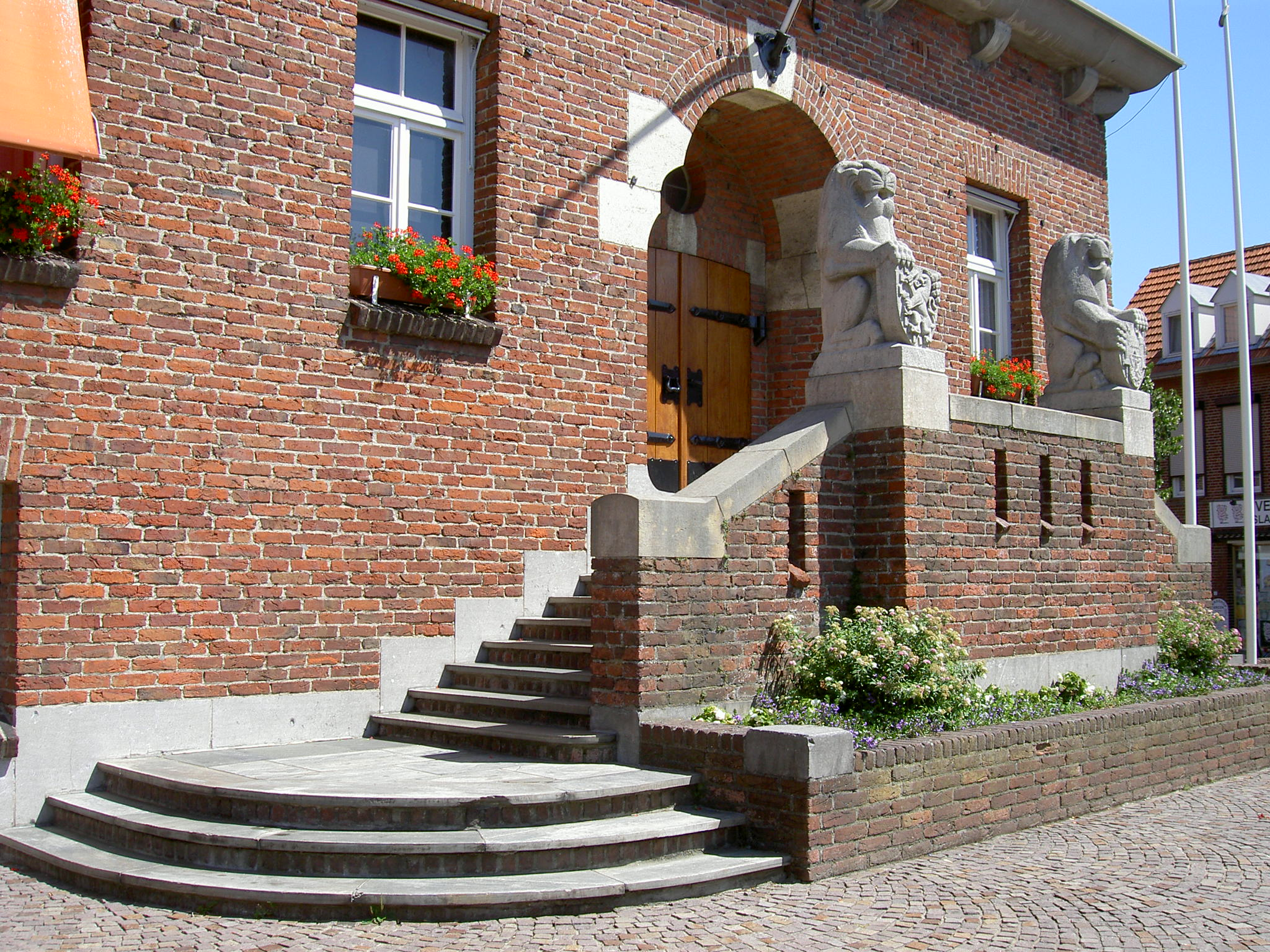 Kropholler heeft een heel typisch gebruik van rode grove baksteen en zware grijze hoekstenen. Op deze foto, zelf genomen tijdens mijn vakantie, is dit goed zichtbaar op de entree van het gemeentehuis van de gemeente Arcen (Limburg).